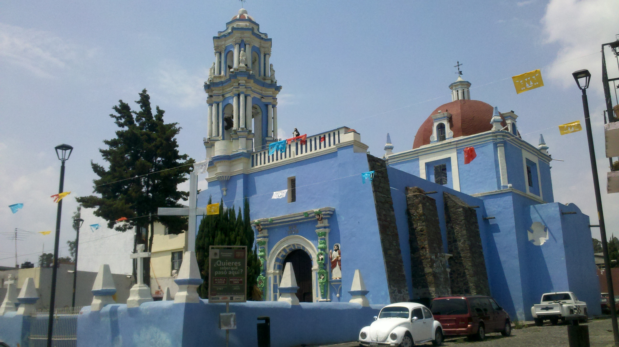 Templo de Santa Inés, Puebla, México. 4 norte entre 30 oriente y 32 oriente.